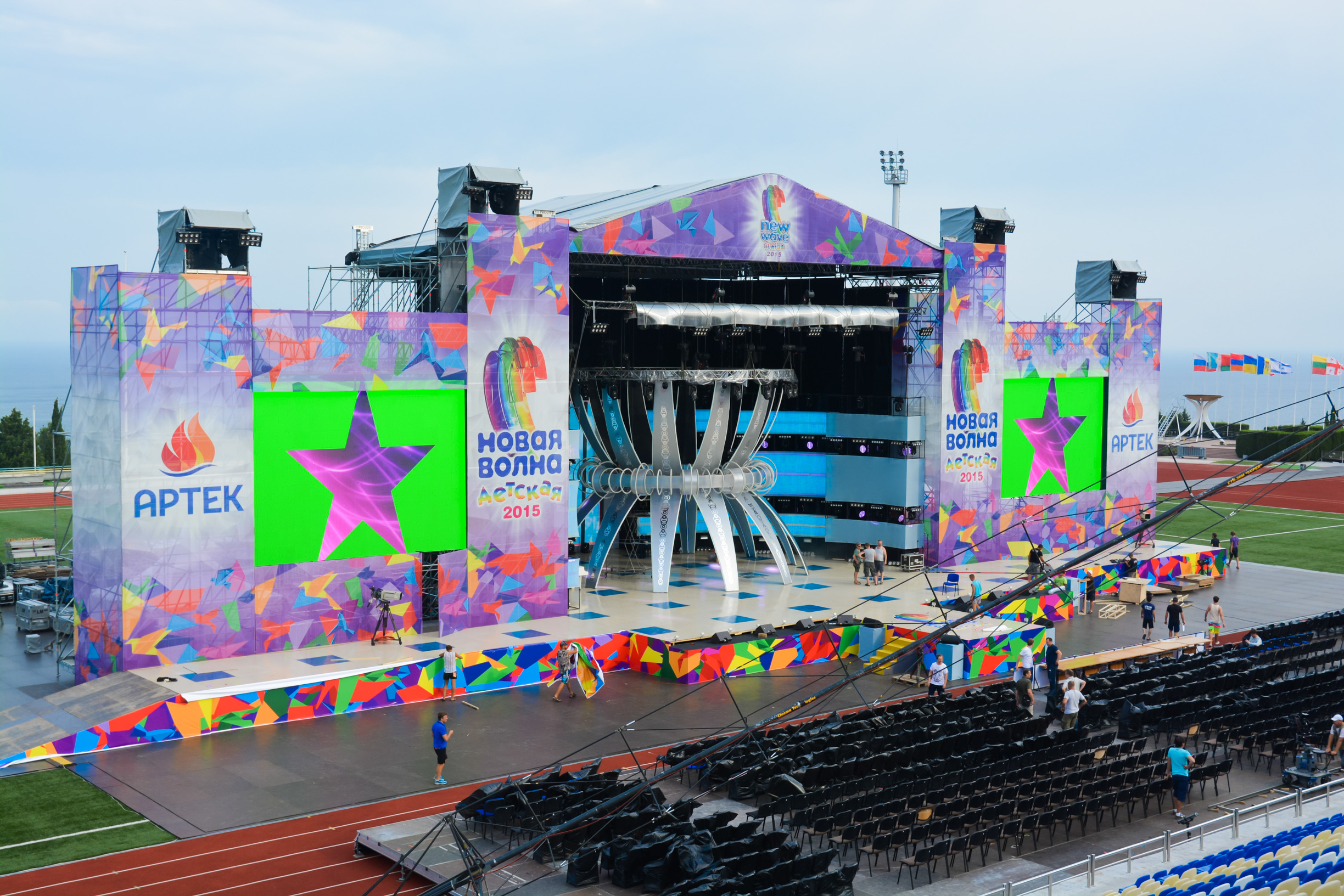 Стадион «Артек» с установленной сценой конкурса «Детская Новая волна»